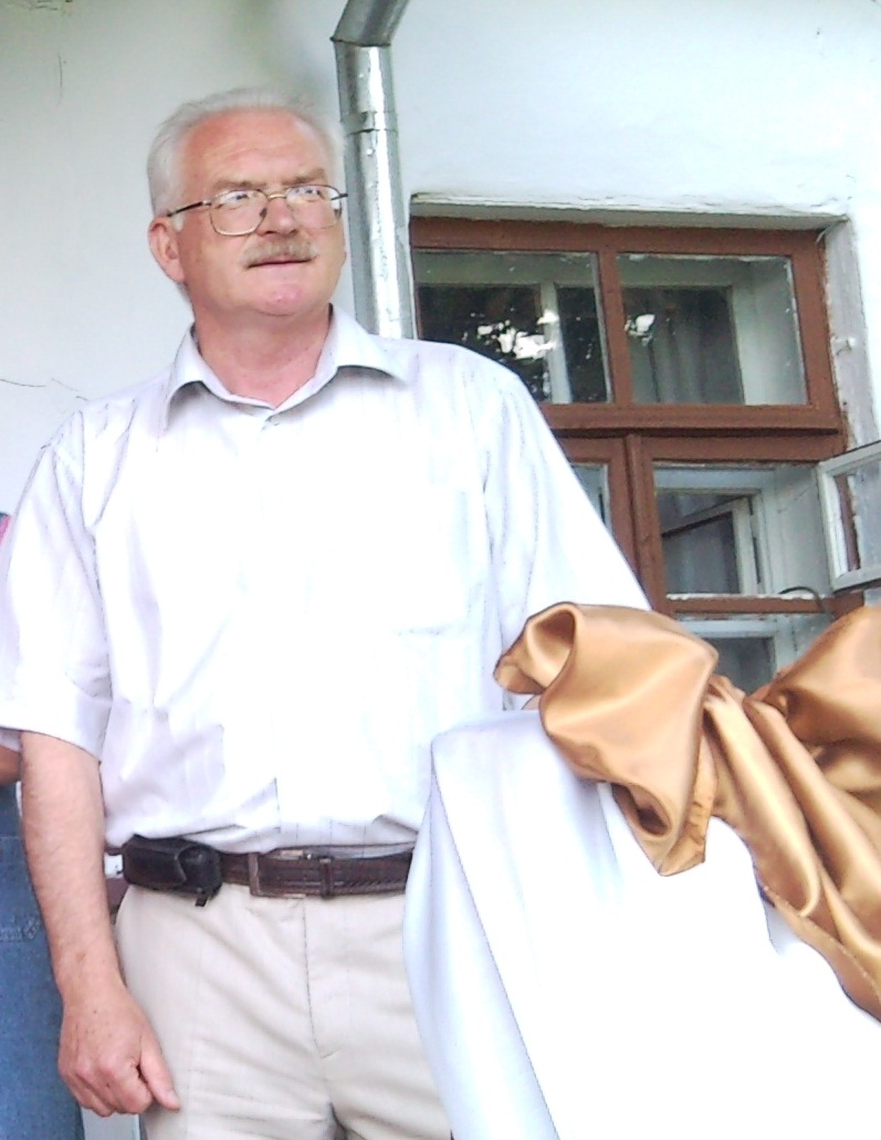 Письменник з Хмельниччини Горбатюк Василь Іванович